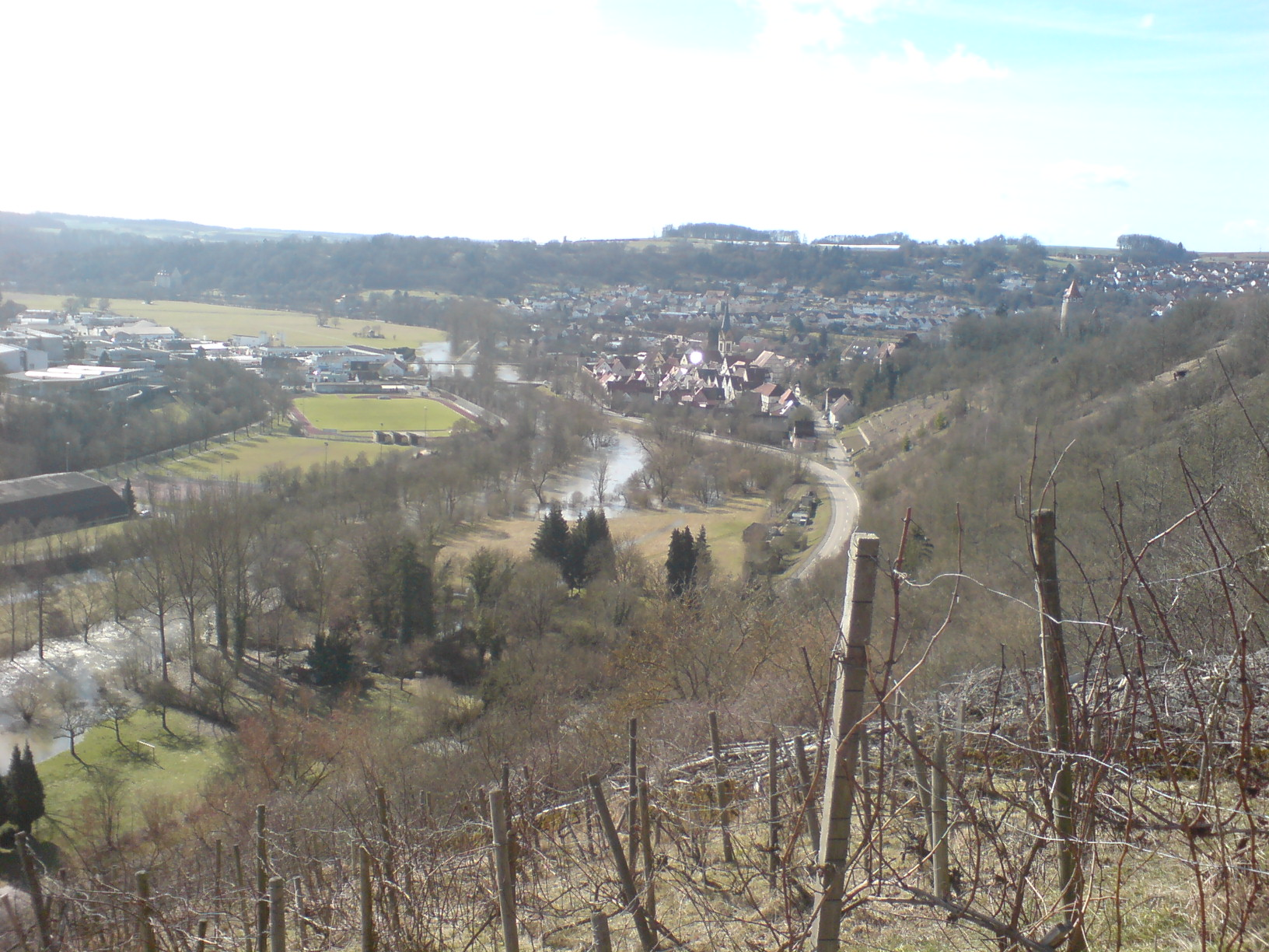 Blick von den Weinbergen zwischen Möckmühl und Ruchsen auf Möckmühl, leichtes Hochwasser der Jagst.